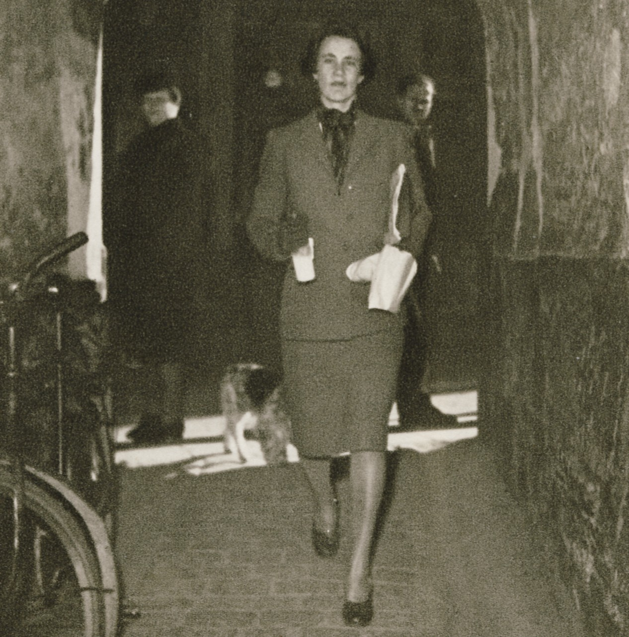 Vera Siöcrona, tidningen "Gamla stans" chefredaktör